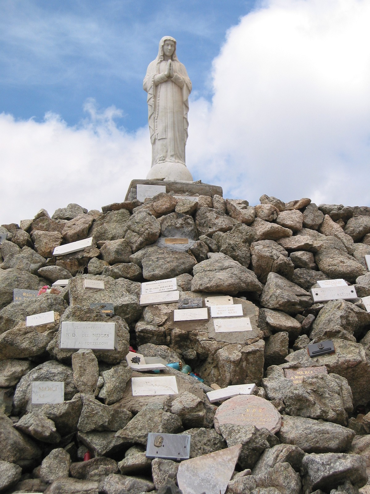 Col de Bavella (Corse-du-Sud, France)